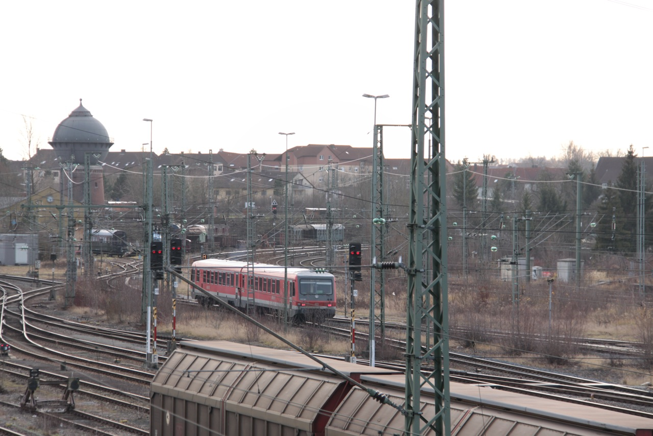 Bahnhof Crailsheim in westlicher Richtung